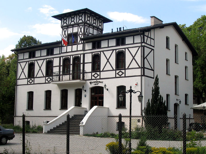 Nowy Dom Strzelecki w Pile